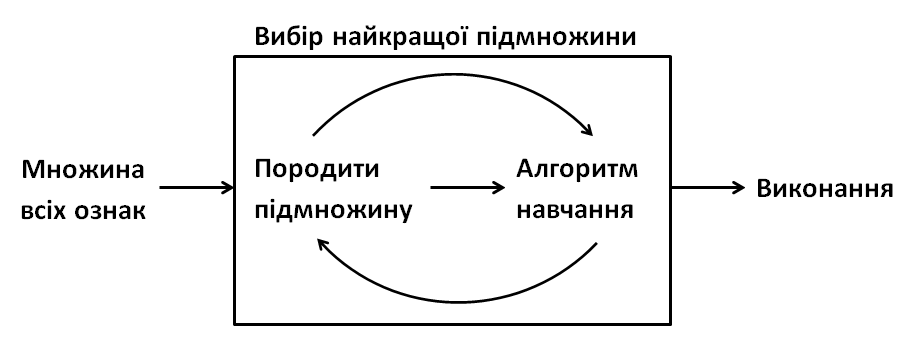 Схема обгорткового методу вибору ознак